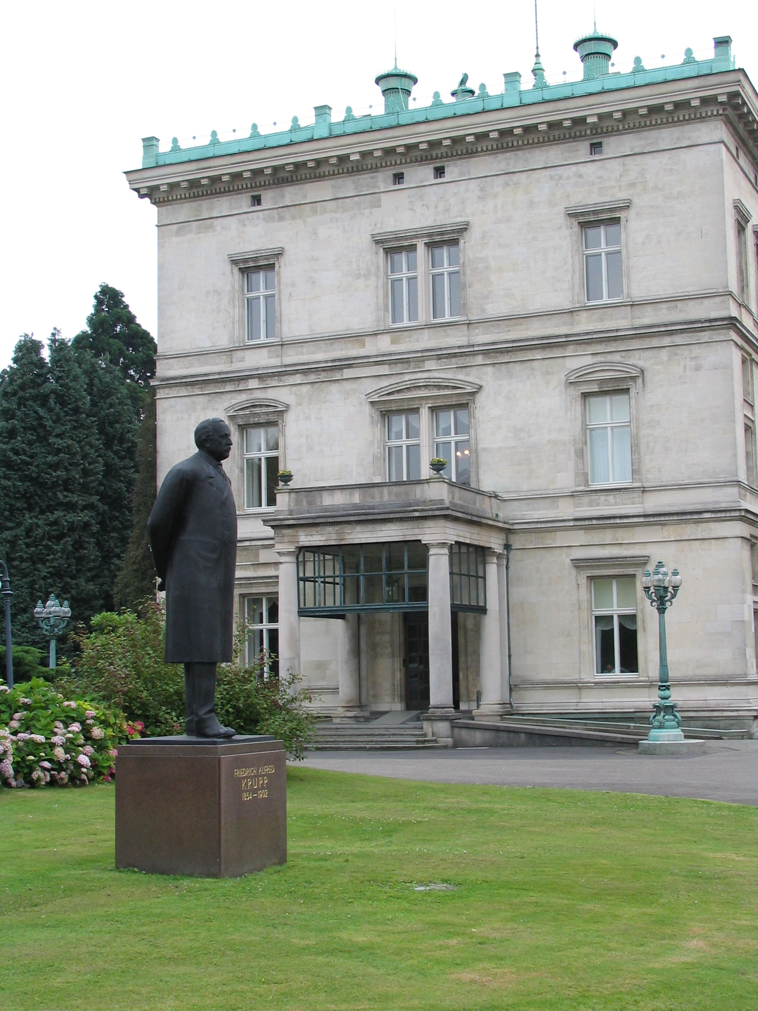 Denkmal für Friedrich Alfred Krupp von Hugo Lederer, vor dem heutigen Krupp-Museum (Teil der Villa Hügel, Essen)